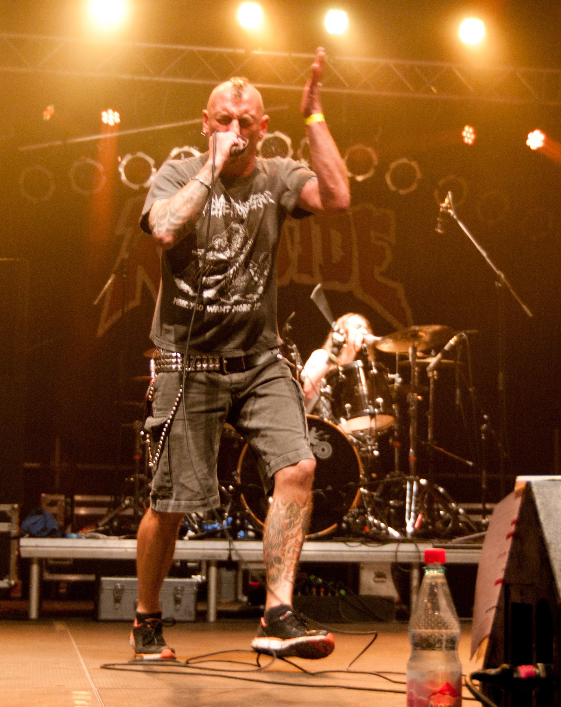 Resist-to-Exist-Punkfestival in Kremmen 2017. Rawside.